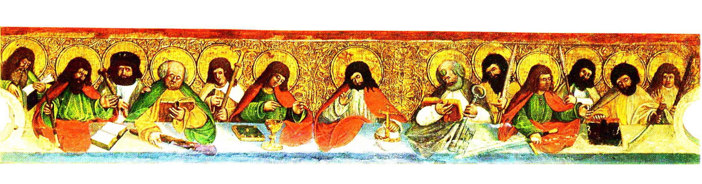 Abendmahl Christi. Kreide in Goldgrund auf Holz. Maße der Holztafel 179,5 cm (Länge) × 35 cm (Höhe). Vermutlich Predella eines Altares aus der Heilbronner Johanneskapelle, jetzt im Historischen Museum der Städtischen Museen Heilbronn.